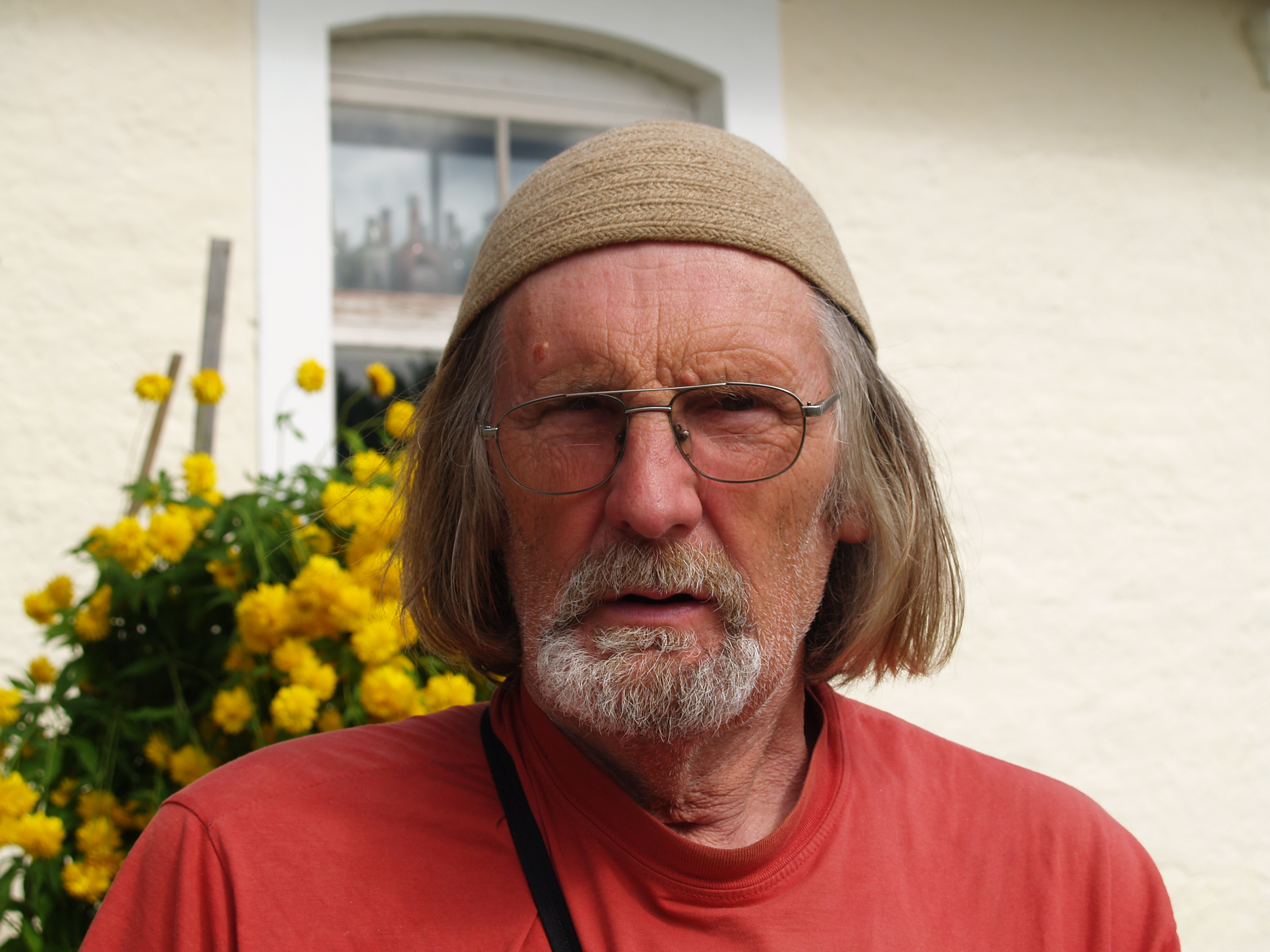 Aarne Vaik Käsmu Meremuuseumi ees.